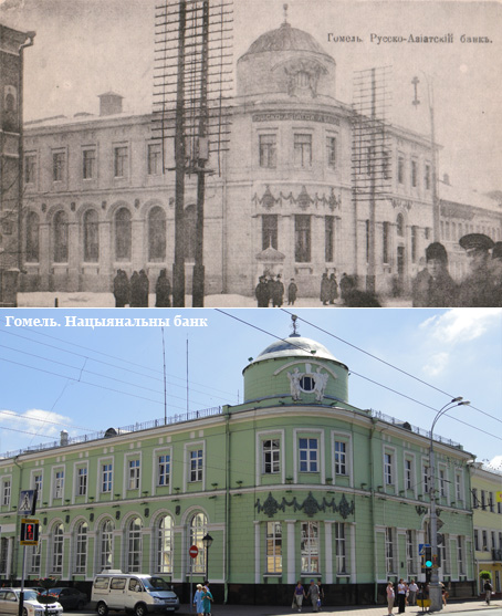 Беларуская (тарашкевіца): г.Гомель. Руска-Азіяцкі банк на рагу вуліц Румянцаўскай і Барона Нолькена. Сёння будынак філіялу Нацыянальнага банка на рагу вуліц Савецкай і Ланге. This is a photo of Belarusian heritage monument. Reference number: 313Г000073 ( WLM)